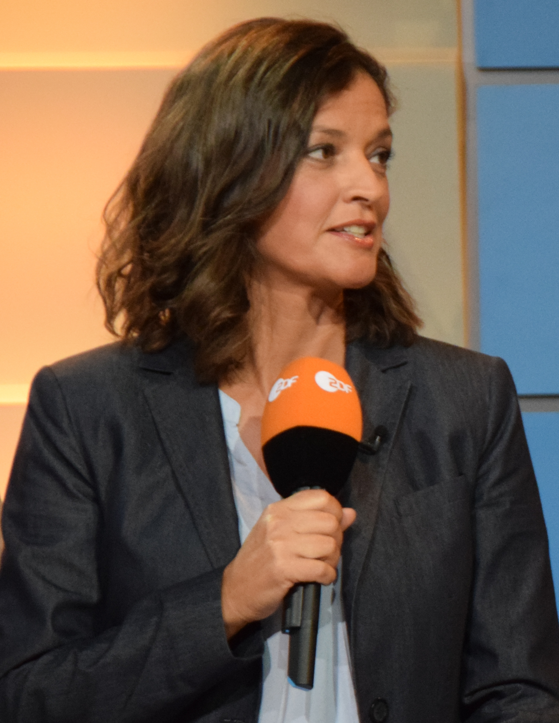 Landtagswahl Thüringen am 14. September 2014